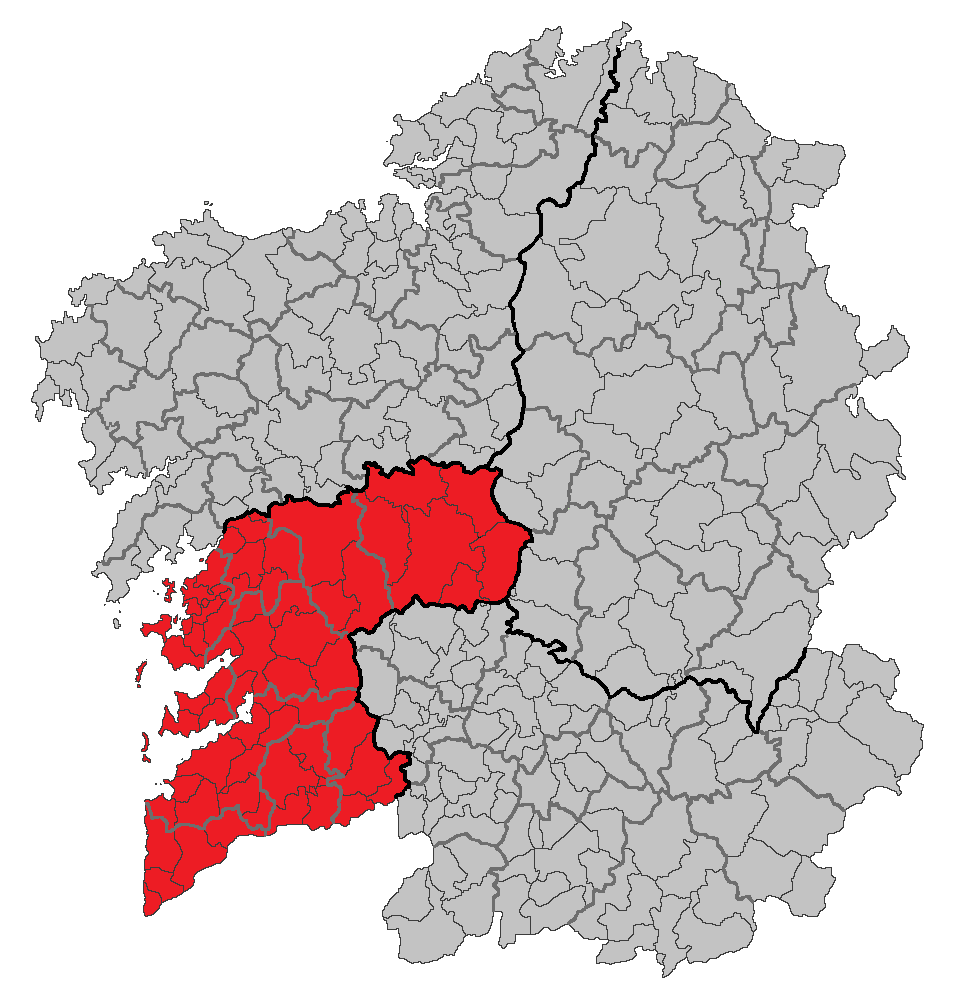 Mapa coa localización da Provincia de Pontevedra.